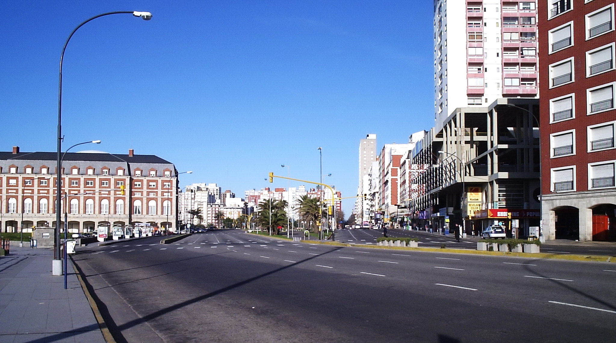 Boulevard Marítimo Peralta Ramos, Mar del Plata. El Casino Cental se ve a la izquierda, y el aún incncluso Bristol Center, a la derecha.